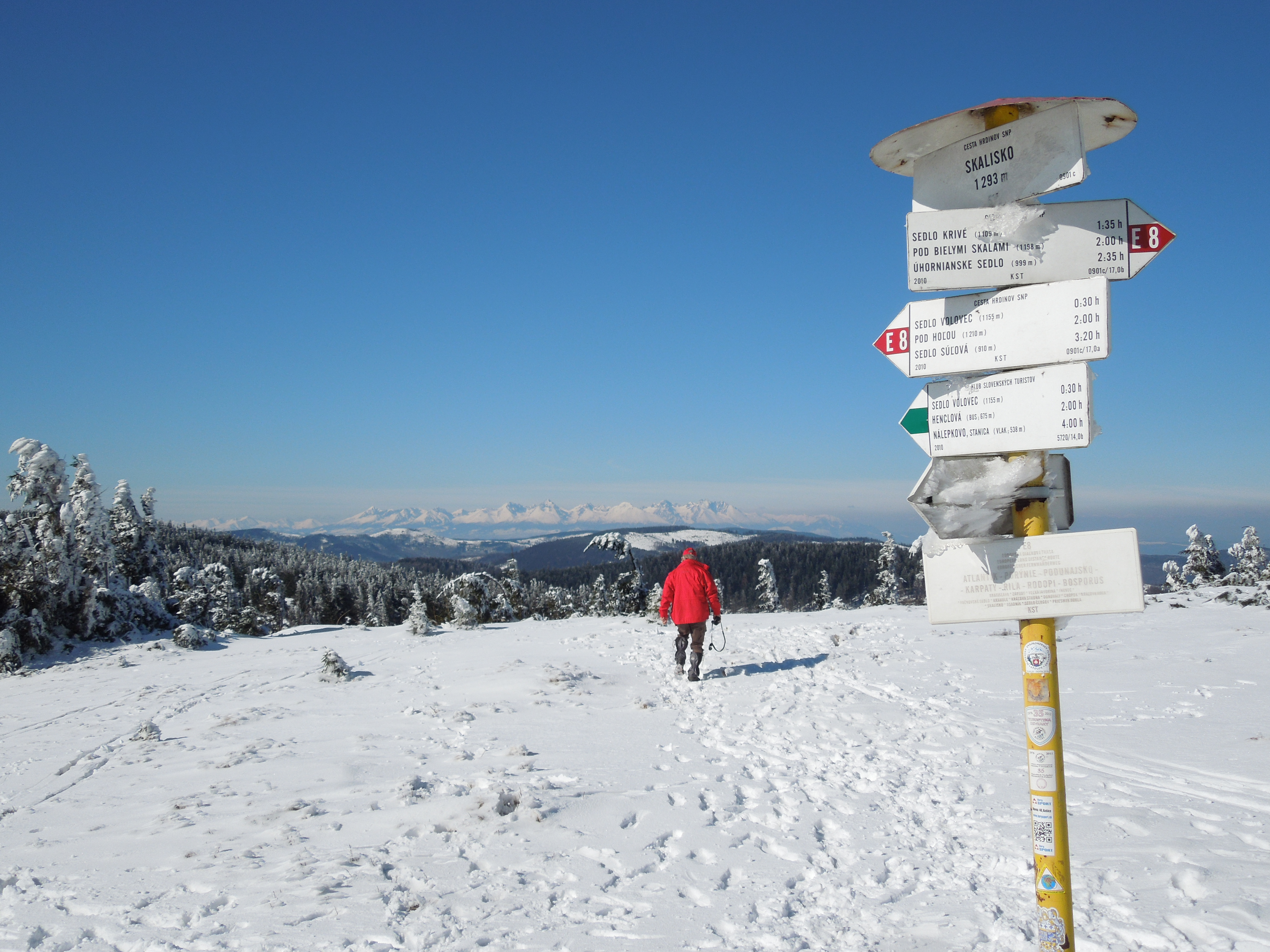 Turistický smerovník na Skalisku, v pozadí Vysoké Tatry